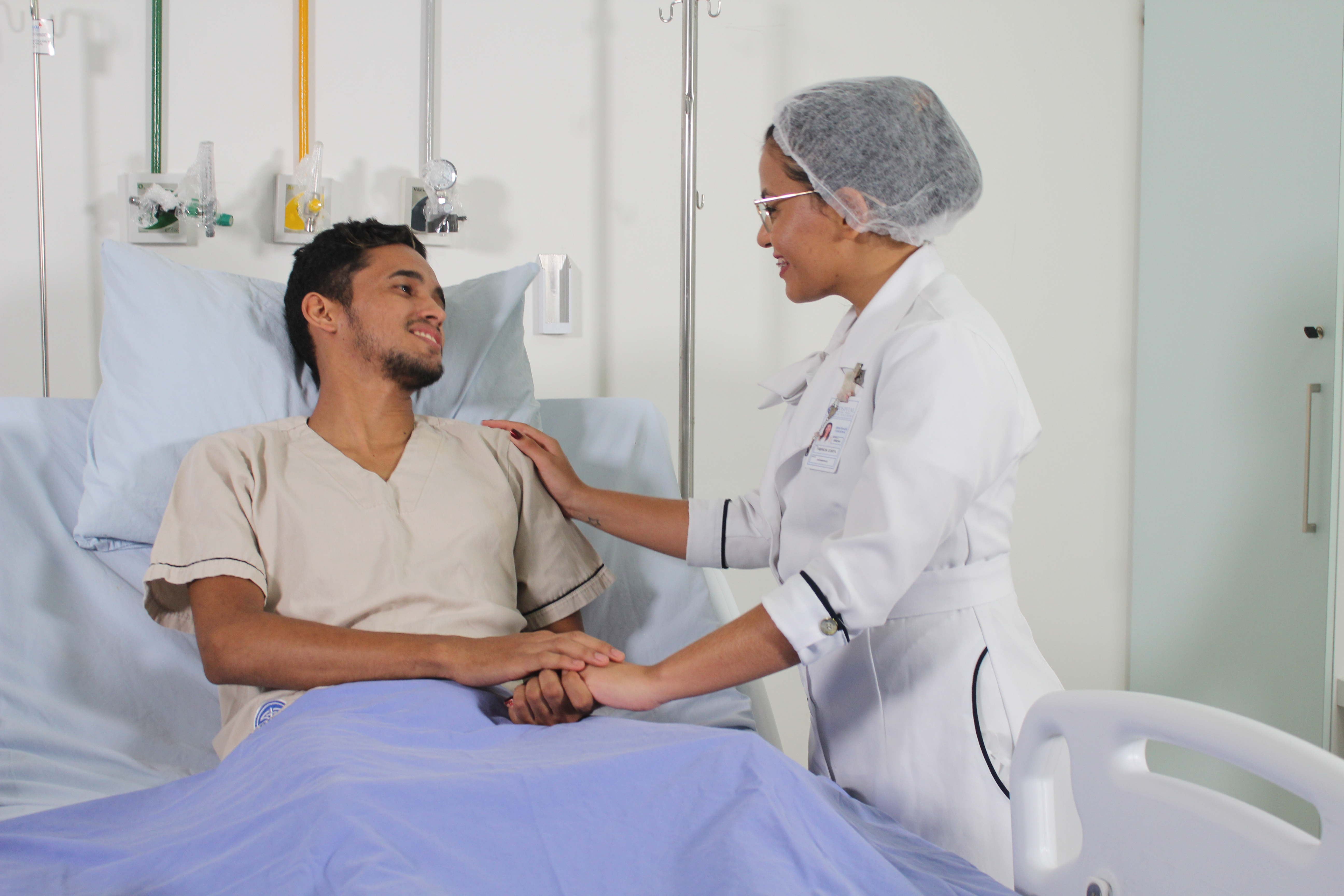 Atendimento humanizado no Hospital Dom Walfrido em Sobral